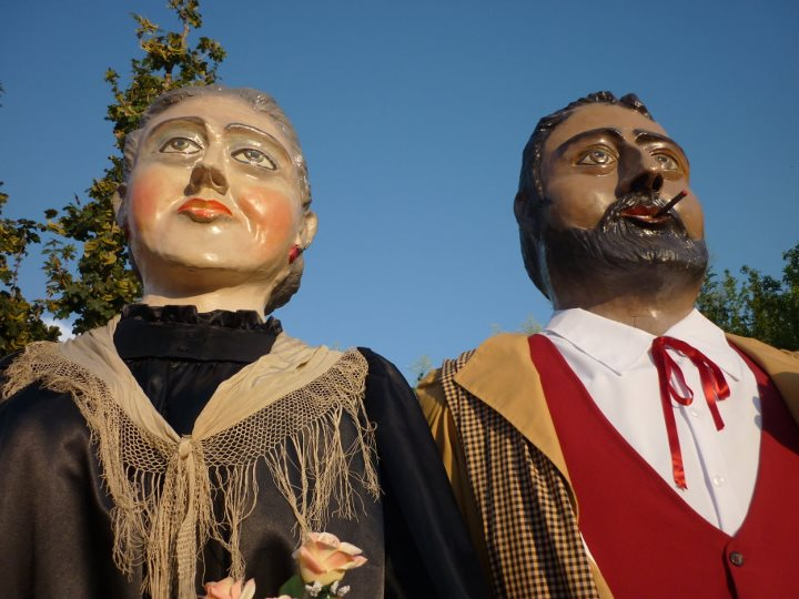 Foto dels gegants la Marieta la Palla i el Parrot de Mollerussa